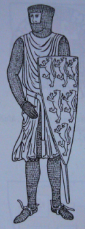 William de Longesée cjmerének rekonstrukciója